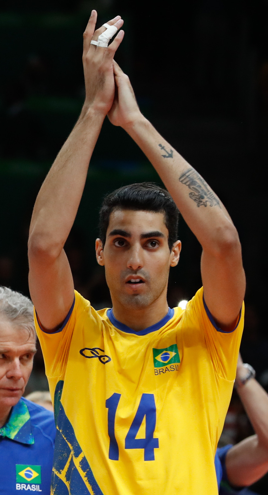 Rio de Janeiro - Seleção brasileira masculina de vôlei vence a da França por 3 sets a 1 no Maracanãzinho e vai às quartas-de-final (Fernando Frazão/Agência Brasil)